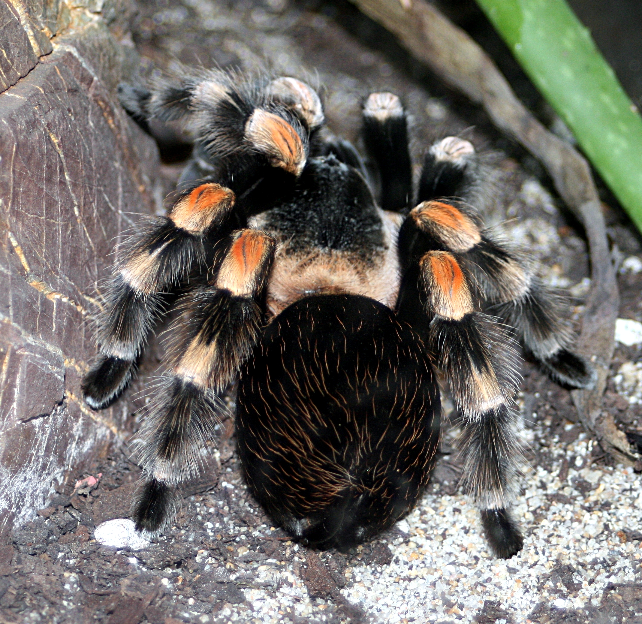 Tarantula